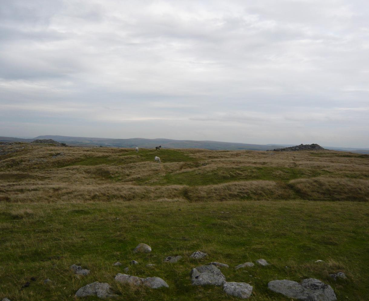 cefn yr ystrad